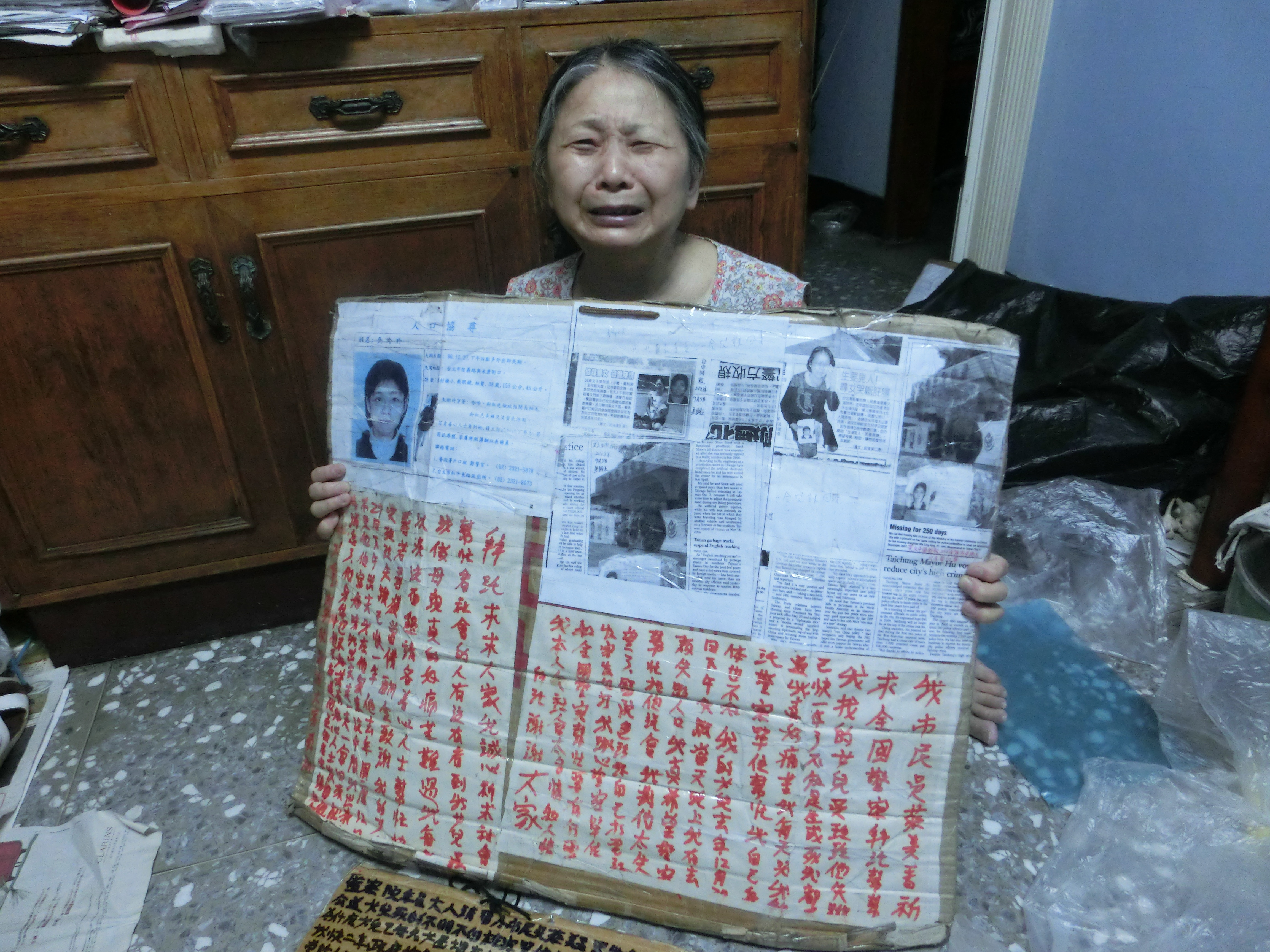 吳蔡美香拿起當年在街頭尋找女兒吳玲玲的看板，一時不禁悲從中來。